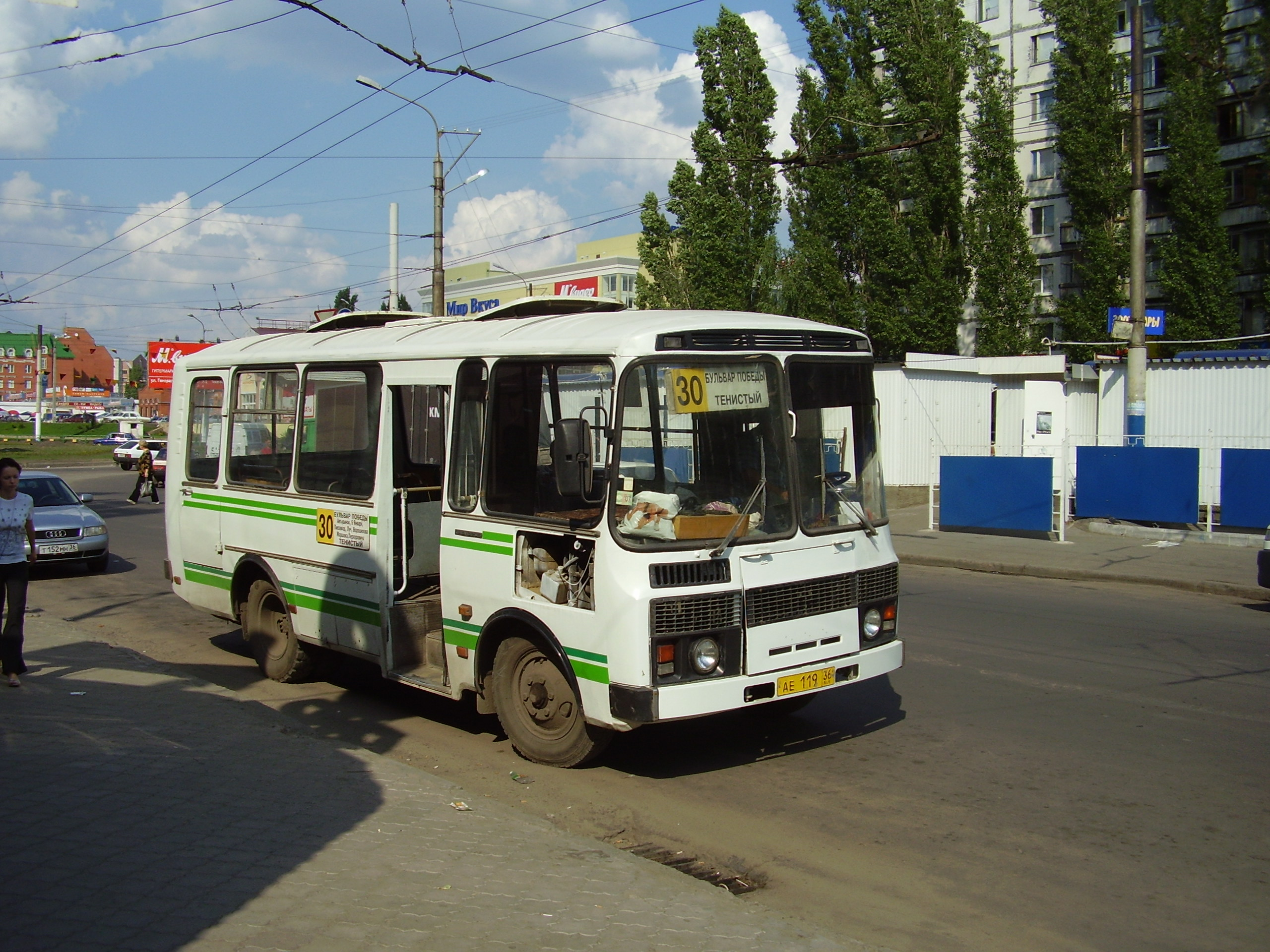 Городской автобус малого класса ПАЗ-3205